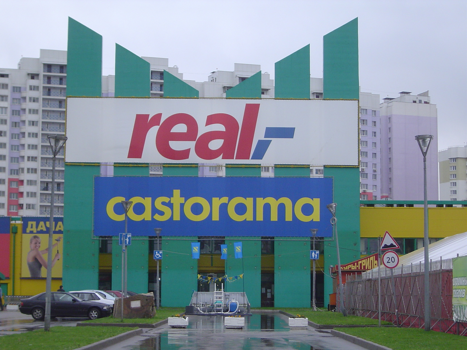 ehemaliger Marktkauf in Moskau Kotelniki